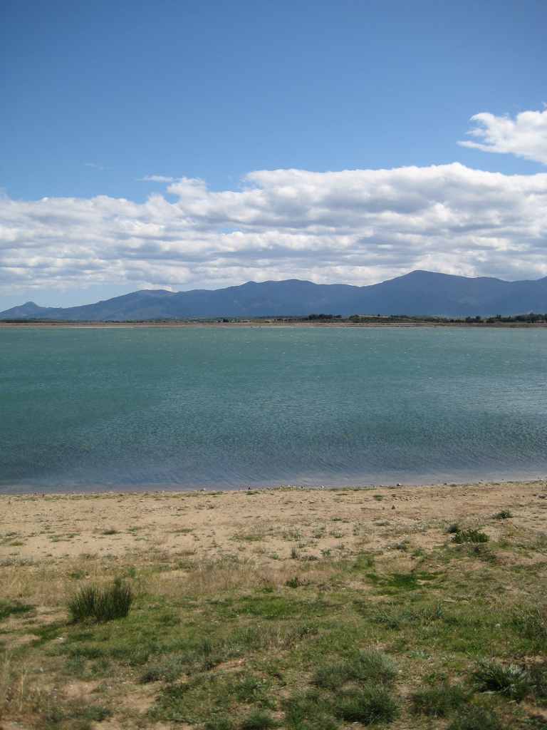 Lake of Villeneuve-de-la-Raho, Pyrénées-orientales, France